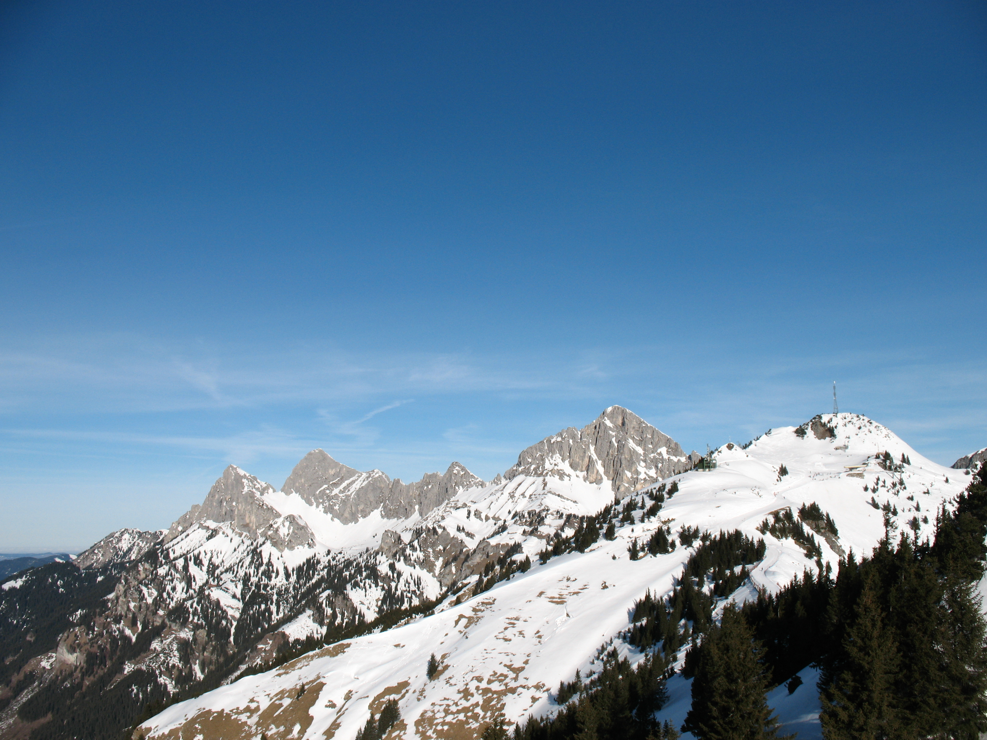 Blick auf den Hahnenkamm (1938 m) mit Skigebiet Hahnenkamm Höfen. Im Hintergrund drei der Tannheimer Hauptgipfel: Rote Flüh (2108 m), Gimpel (2173 m) und Kellenspitze (2238 m).